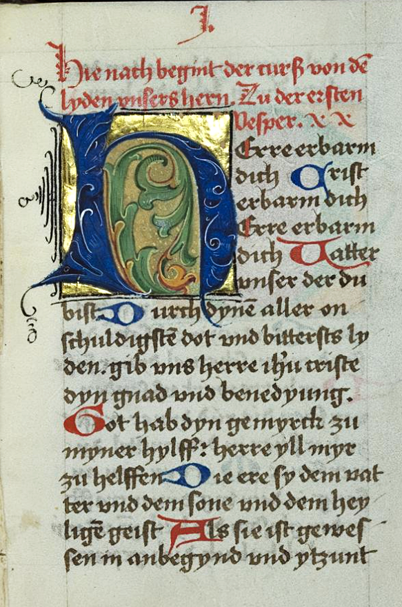 Seite 1 des Cod. Pal. germ. 440 (Tagzeiten vom Leiden Christi und Tagzeiten Mariä)